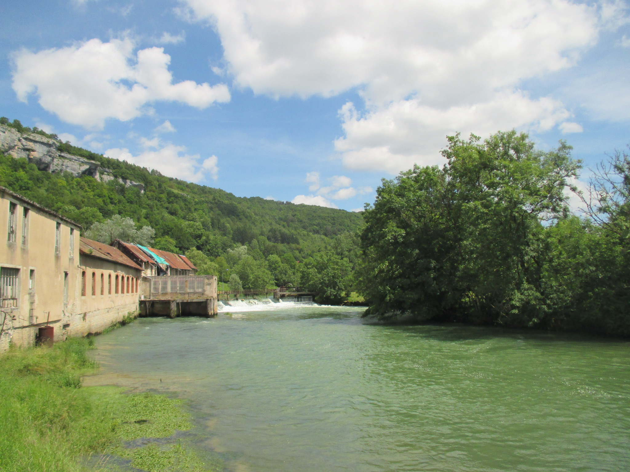 Vallée de la Loue : Ornans